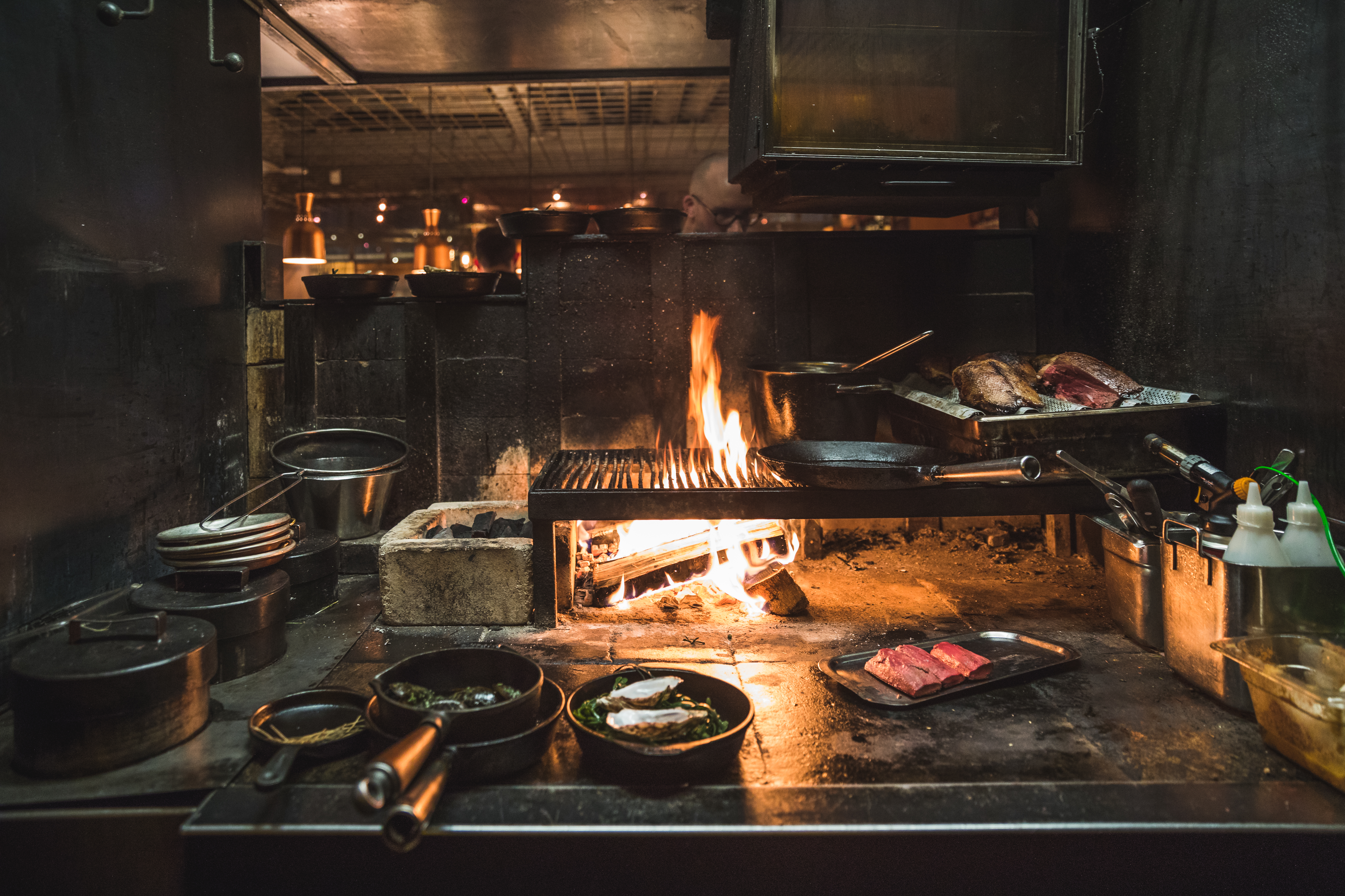 AV4A6627